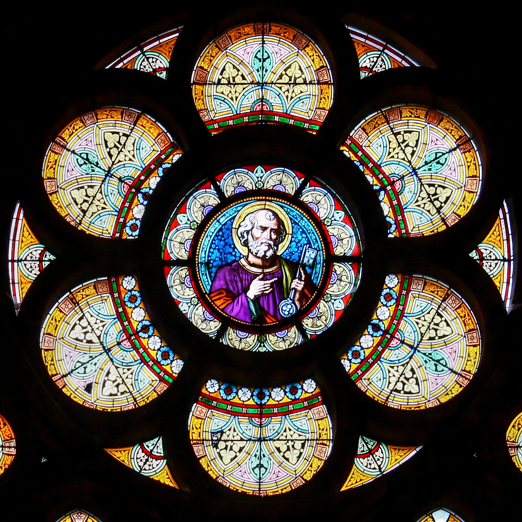 Die Martin-Luther-Kirche in Geringswalde 2010 - Rosette auf der Nordseite mit dem Apostel Petrus